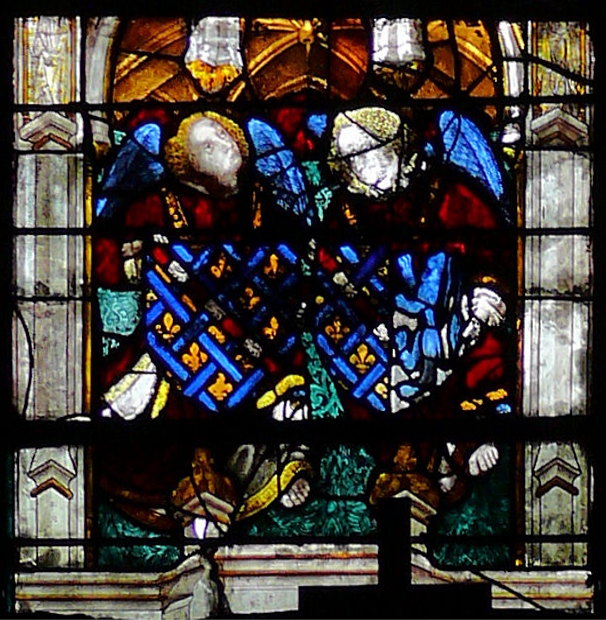 Armes de Jean de Bourbon (gauche) et Catherine de Vendôme (droite)